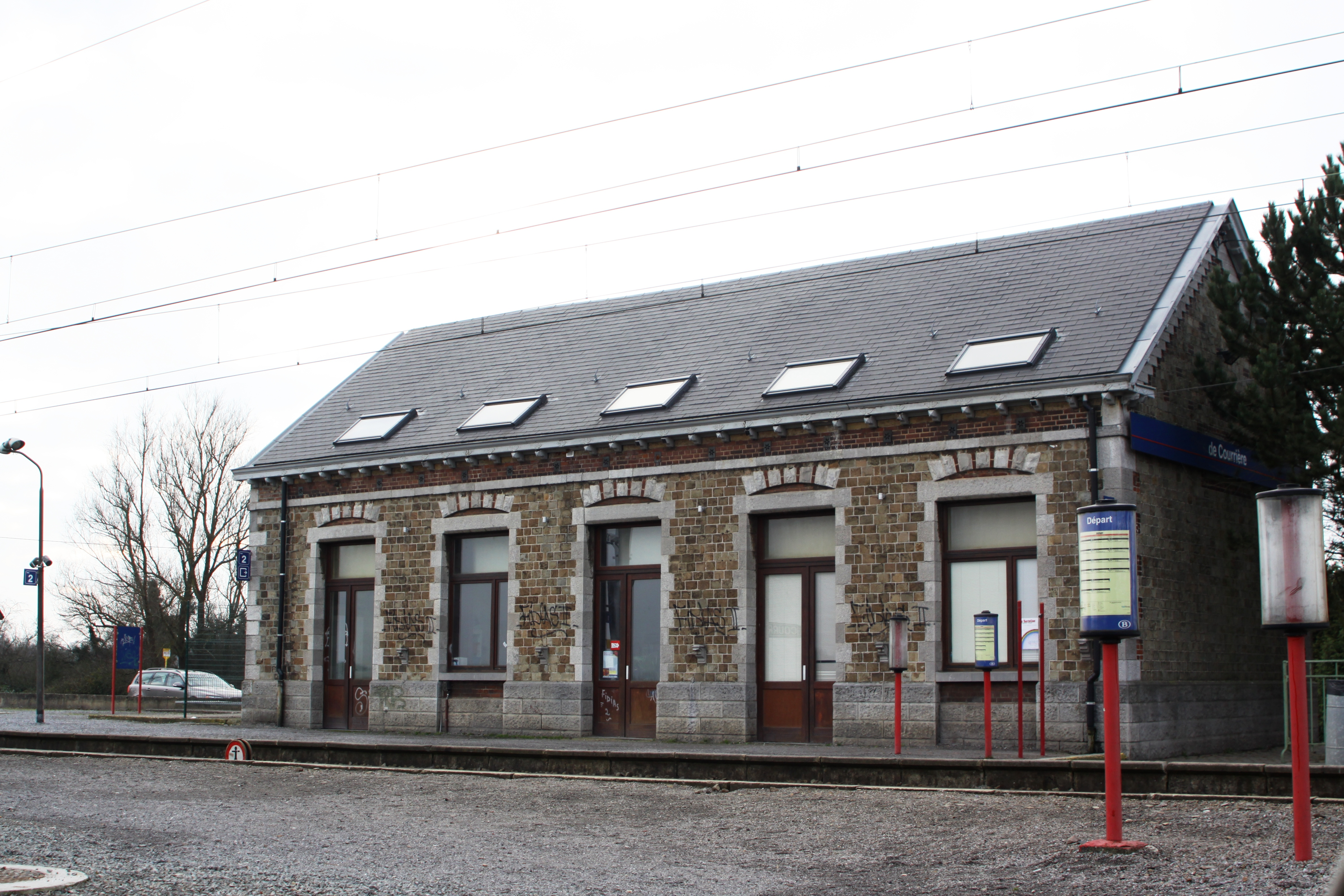 Gare de Courrière